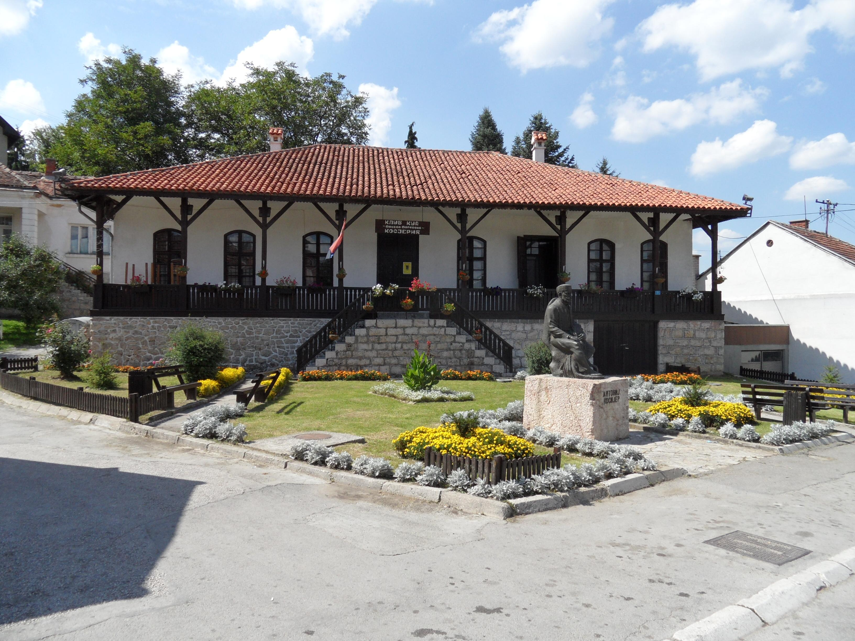 Stari han u Kosjeriću